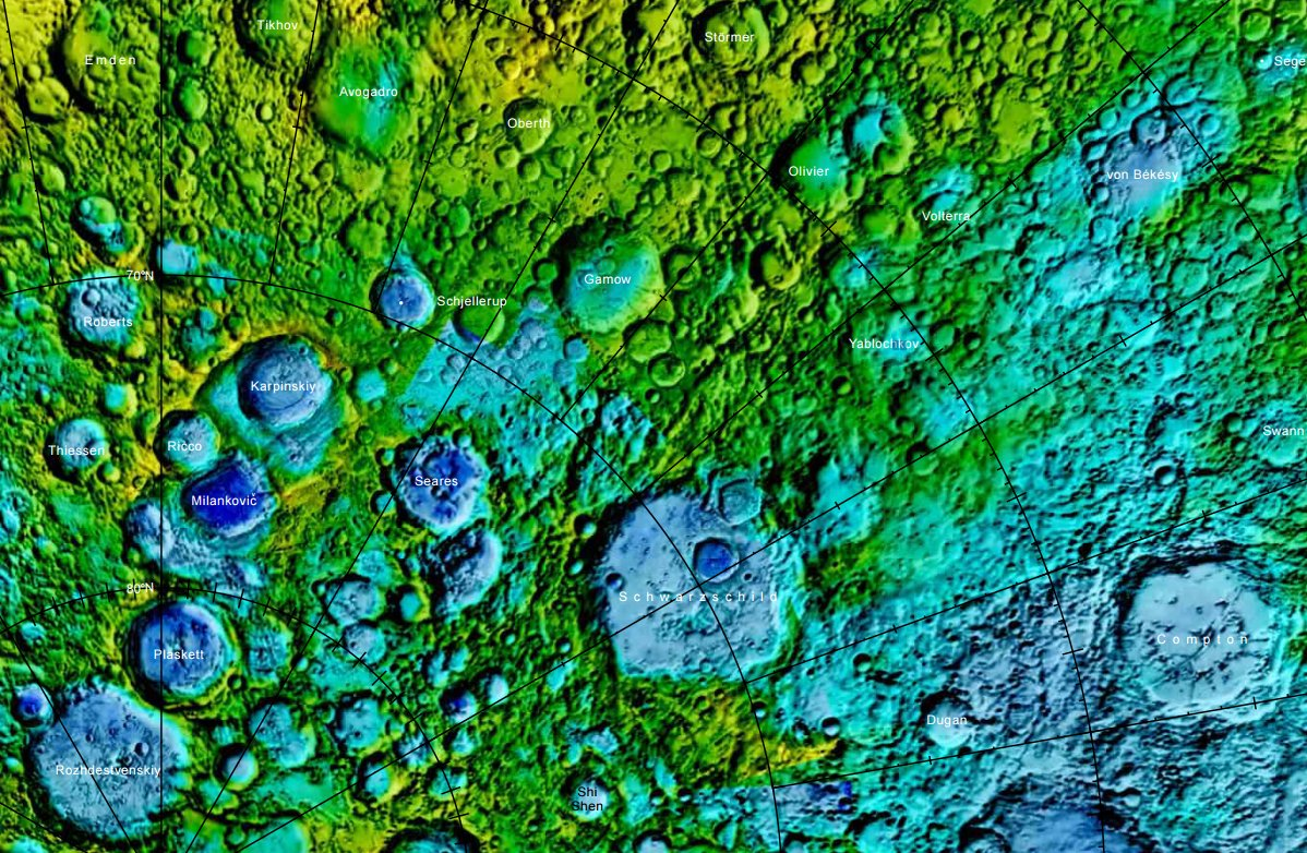 Cráter lunar Gamow. Localización. (Imagen LRO)